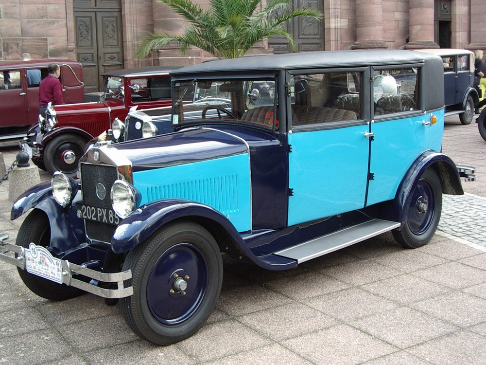 Mathis MY4S (1924), voiture française Author: Rémi Stosskopf Date: 25 august 2006